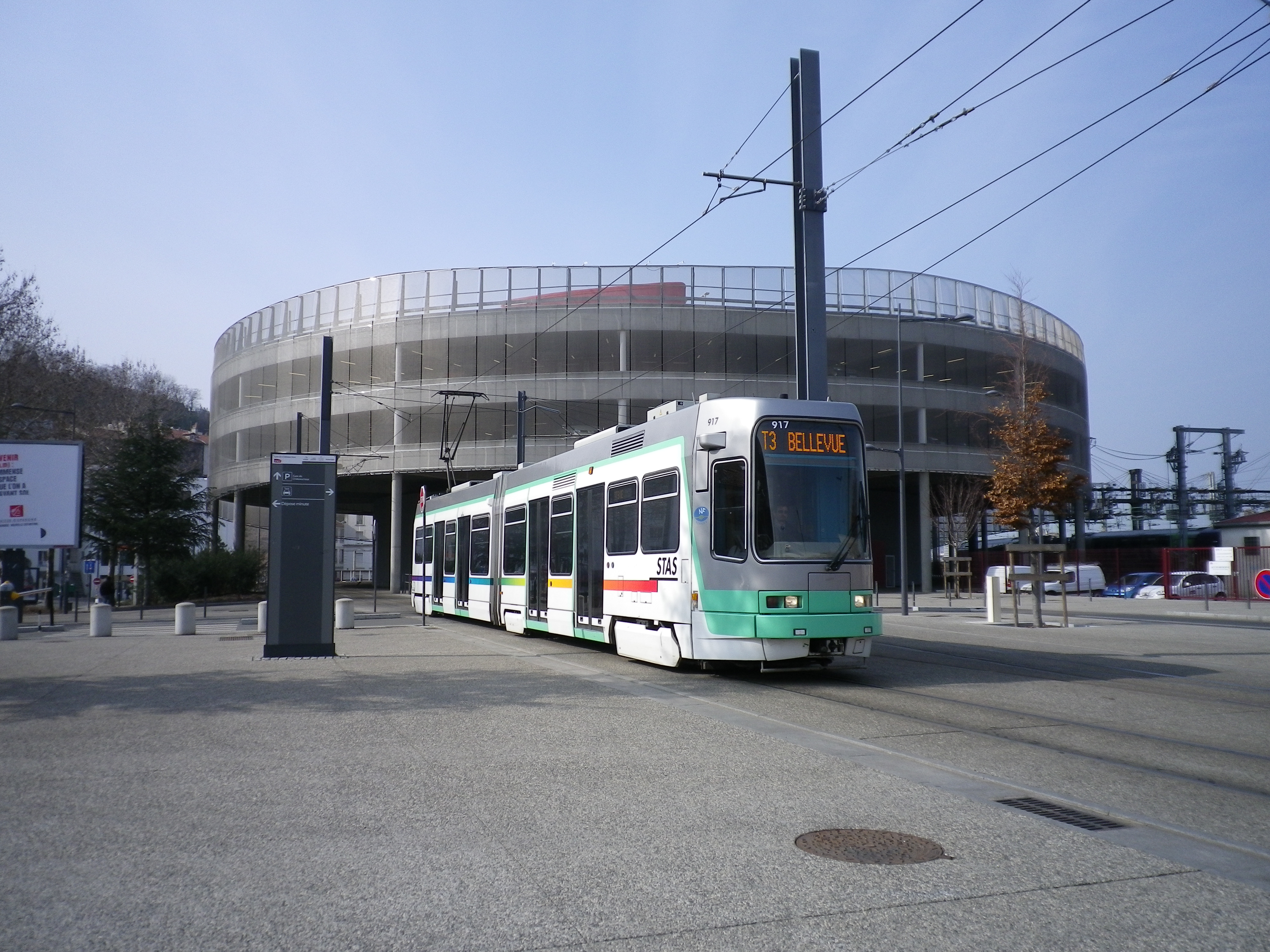 Vevey-Alsthom - Rame 917 STAS - Saint-Etienne ChâteaucreuxPentax Optio H90